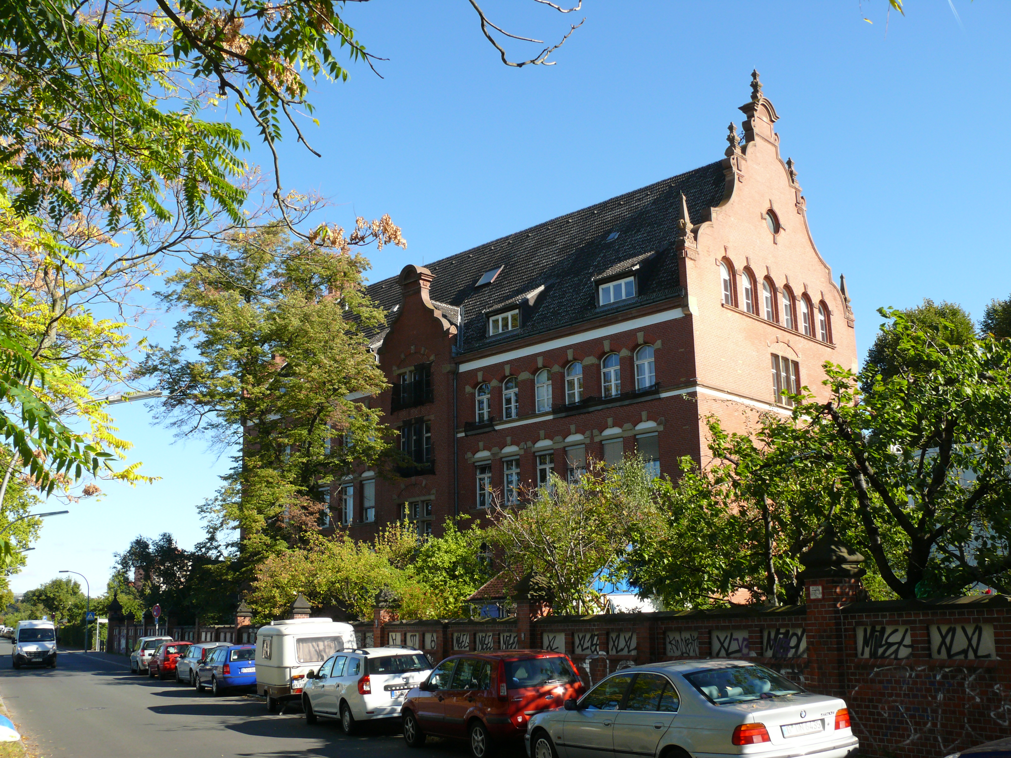 Berlin-Tempelhof Robert Koch-Institut Außenstelle General-Pape-Straße